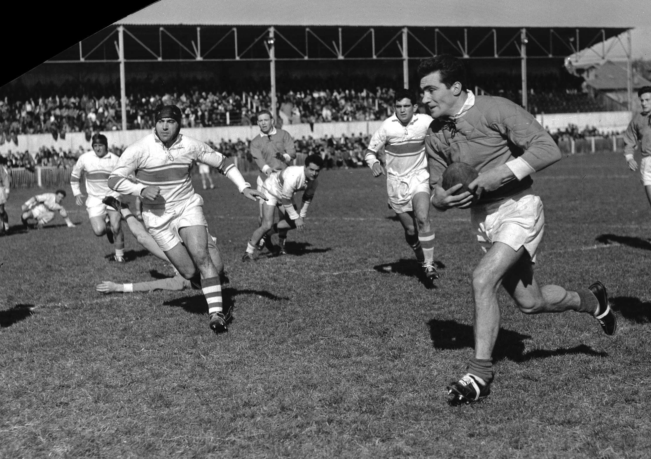 Stade Arnauné (Stade des Minimes), rue Frédéric Estèbe. 24 mai 1957. Equipe du Toulouse Olympique XIII (rugby à XIII) rencontre l'équipe de Lézignan. Cliché pris durant le match ; au 1er plan action de jeu ; en arrière plan tribune du stade. Observation: Plaque de verre cassée, il manque plusieurs morceaux (côté droit de la photo, en haut et en bas à gauche).